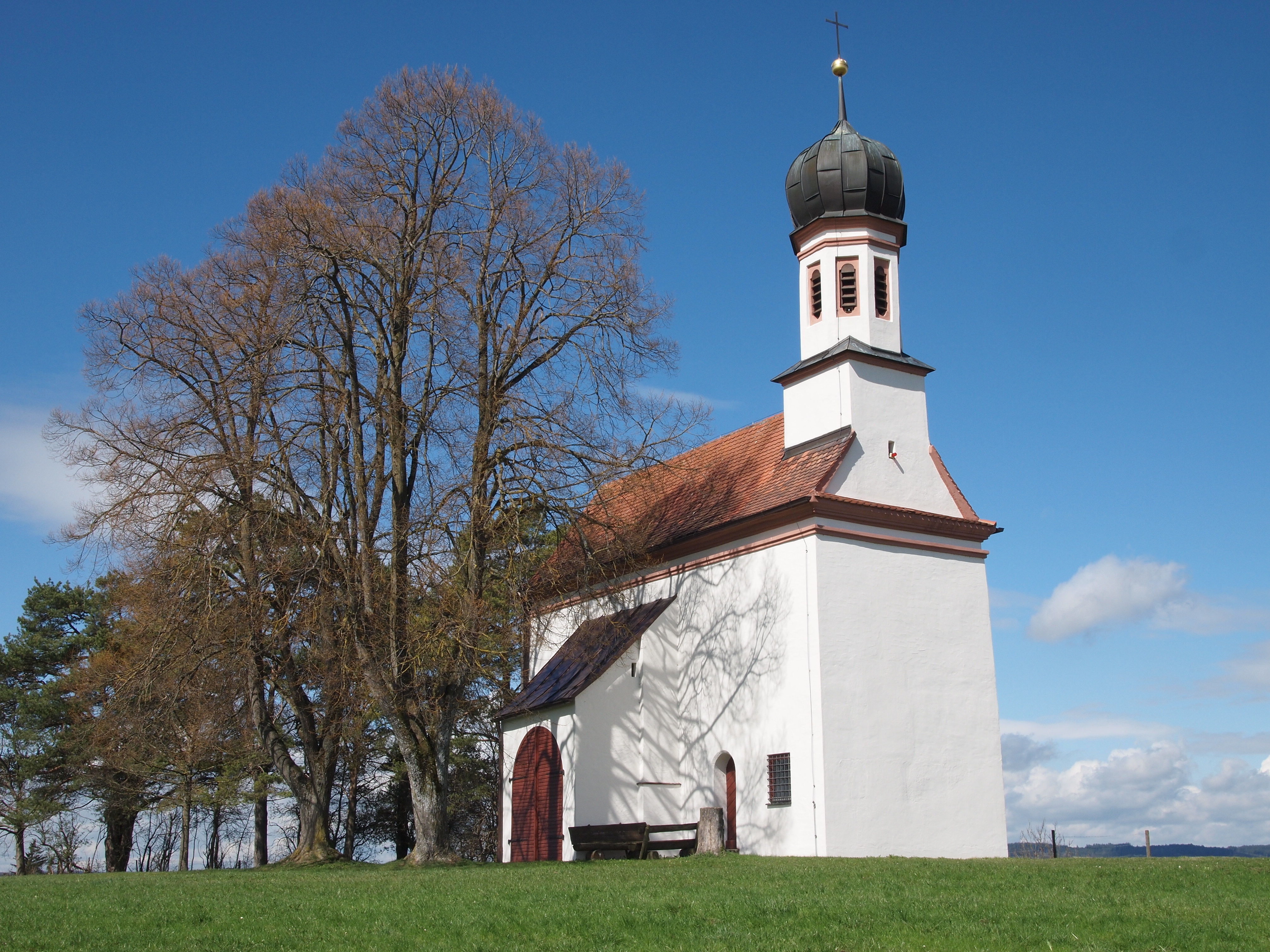 Biessenhofen OT Altdorf, Loretokapelle